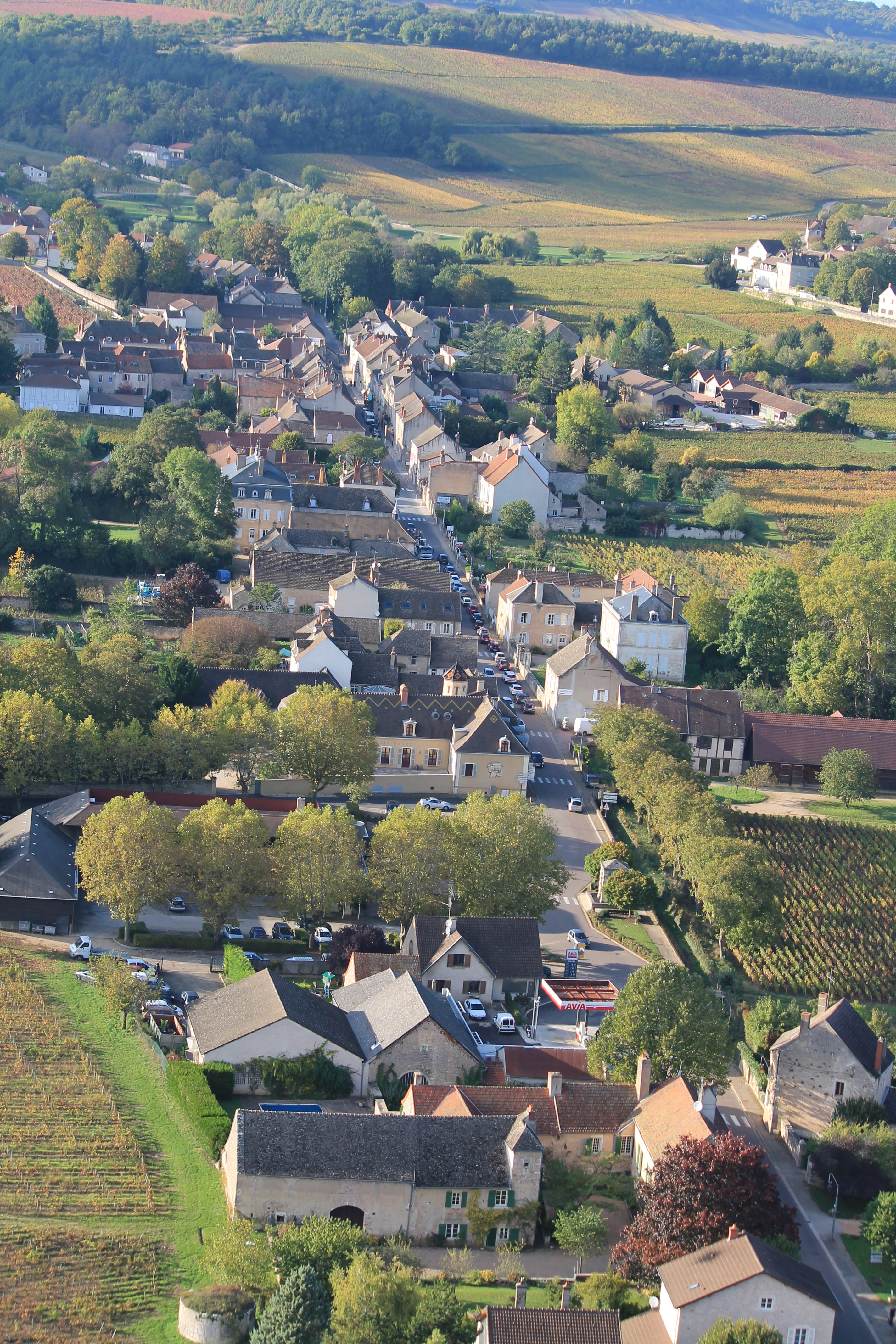 Vue du centre de Mercurey (Bourg) avec la départementale 978 (Chalon-Autun) et du vignoble a coté.